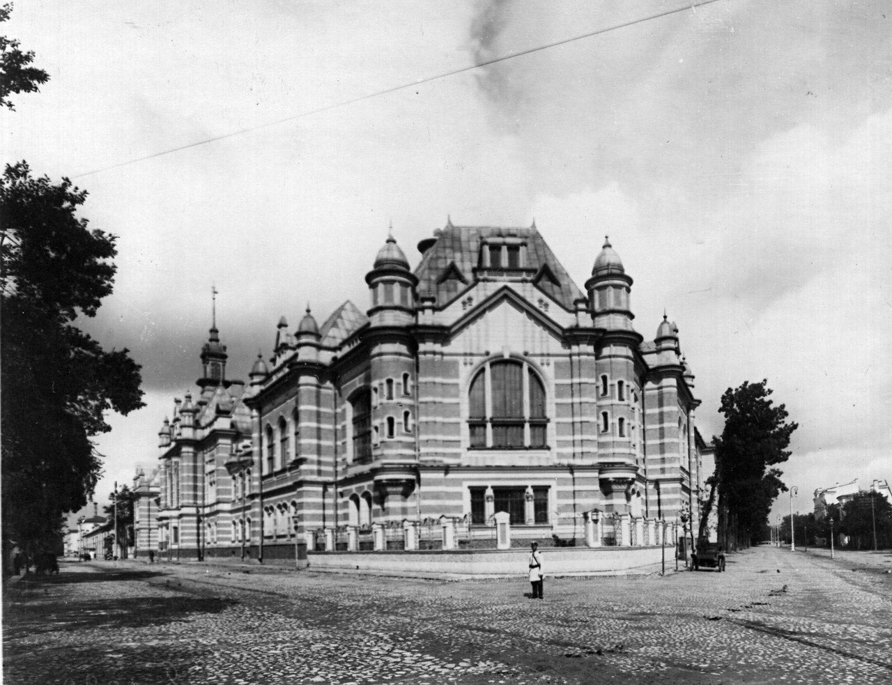 Угловой фасад здания электротехнического института по проекту архитектора А. Н. Векшинского (1899-1903).